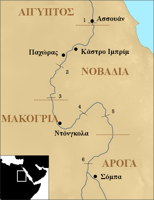 Η Χριστιανική Νουβία και οι καταρράκτες του Νείλου.